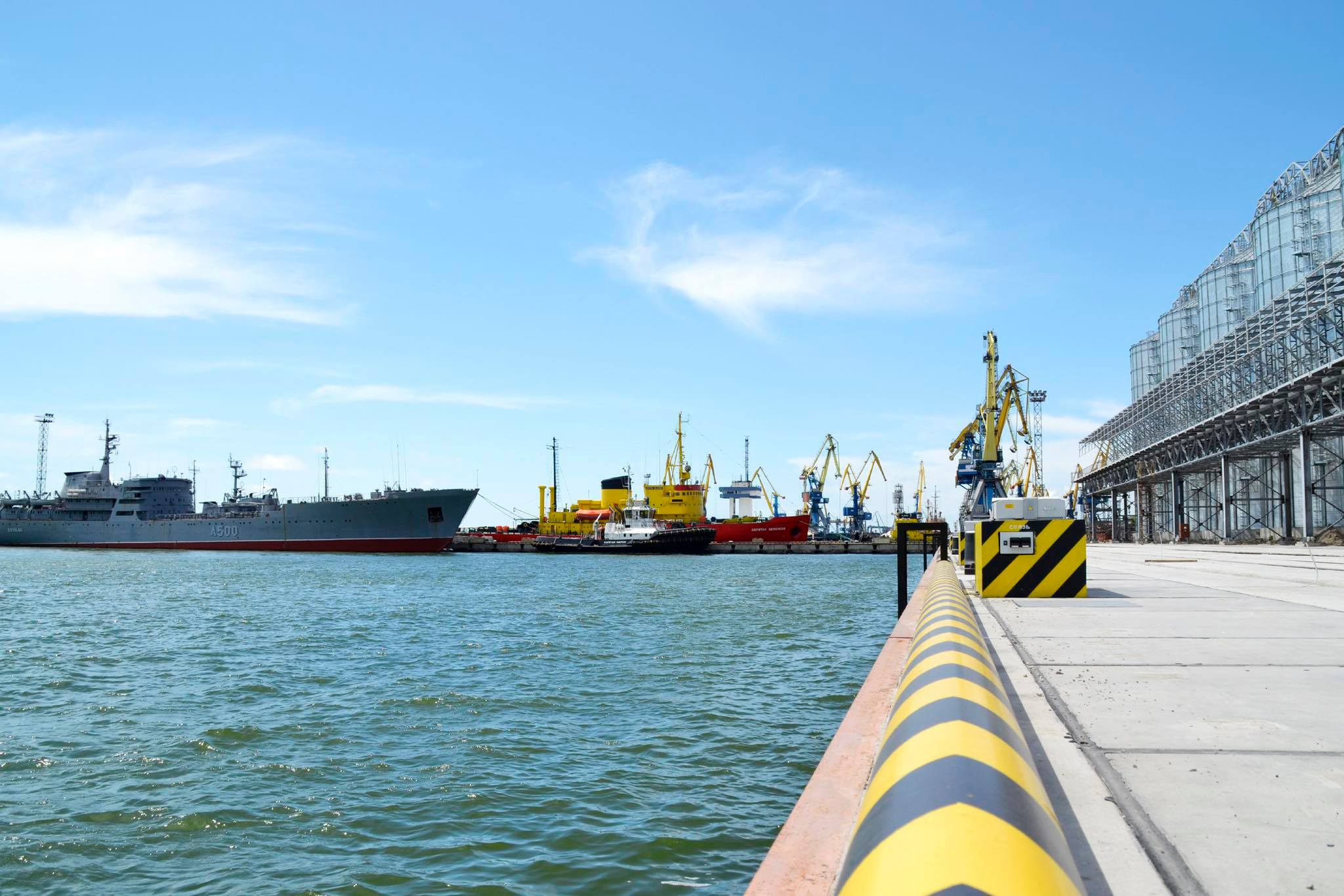 Маріупольський морський торговельний порт